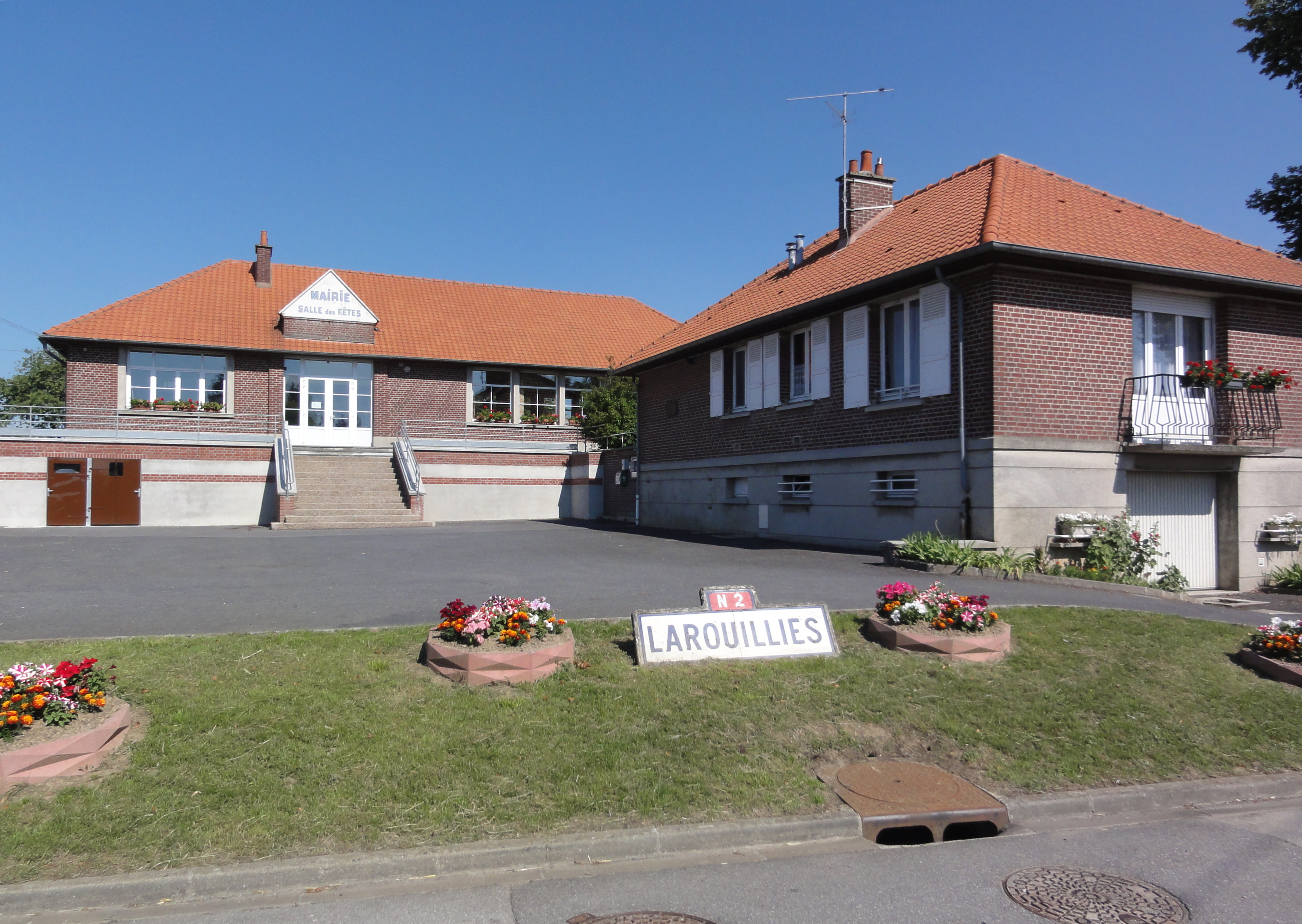 Larrouillies (Nord, Fr) mairie, salle des fêtes